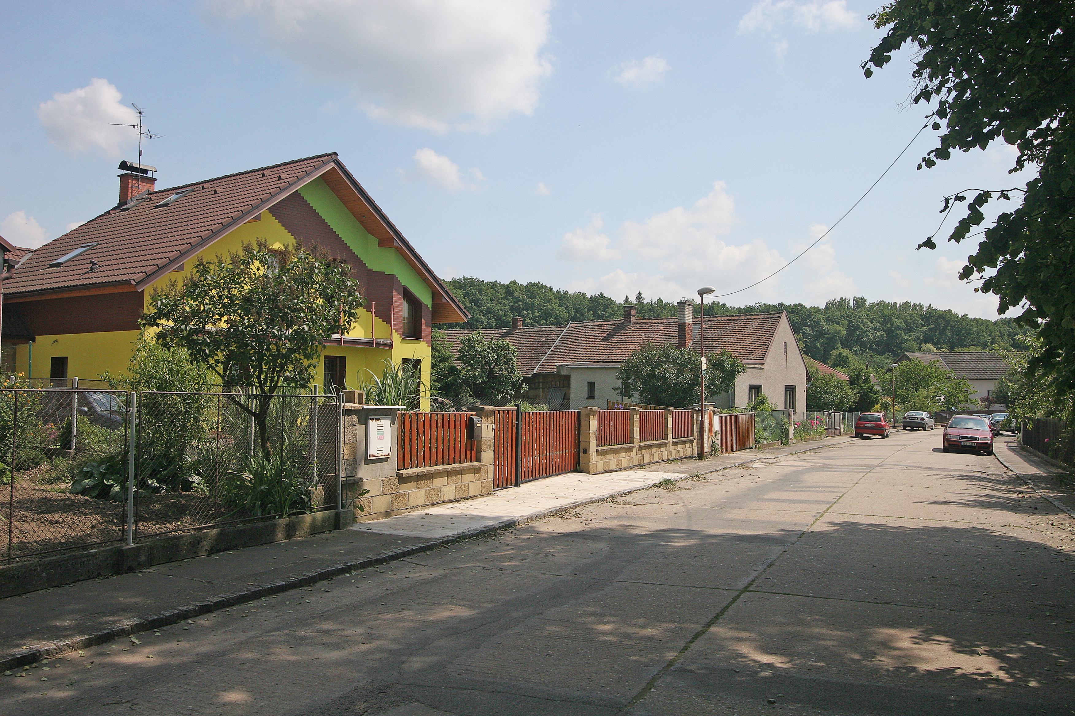 Nový Přím čp. 4